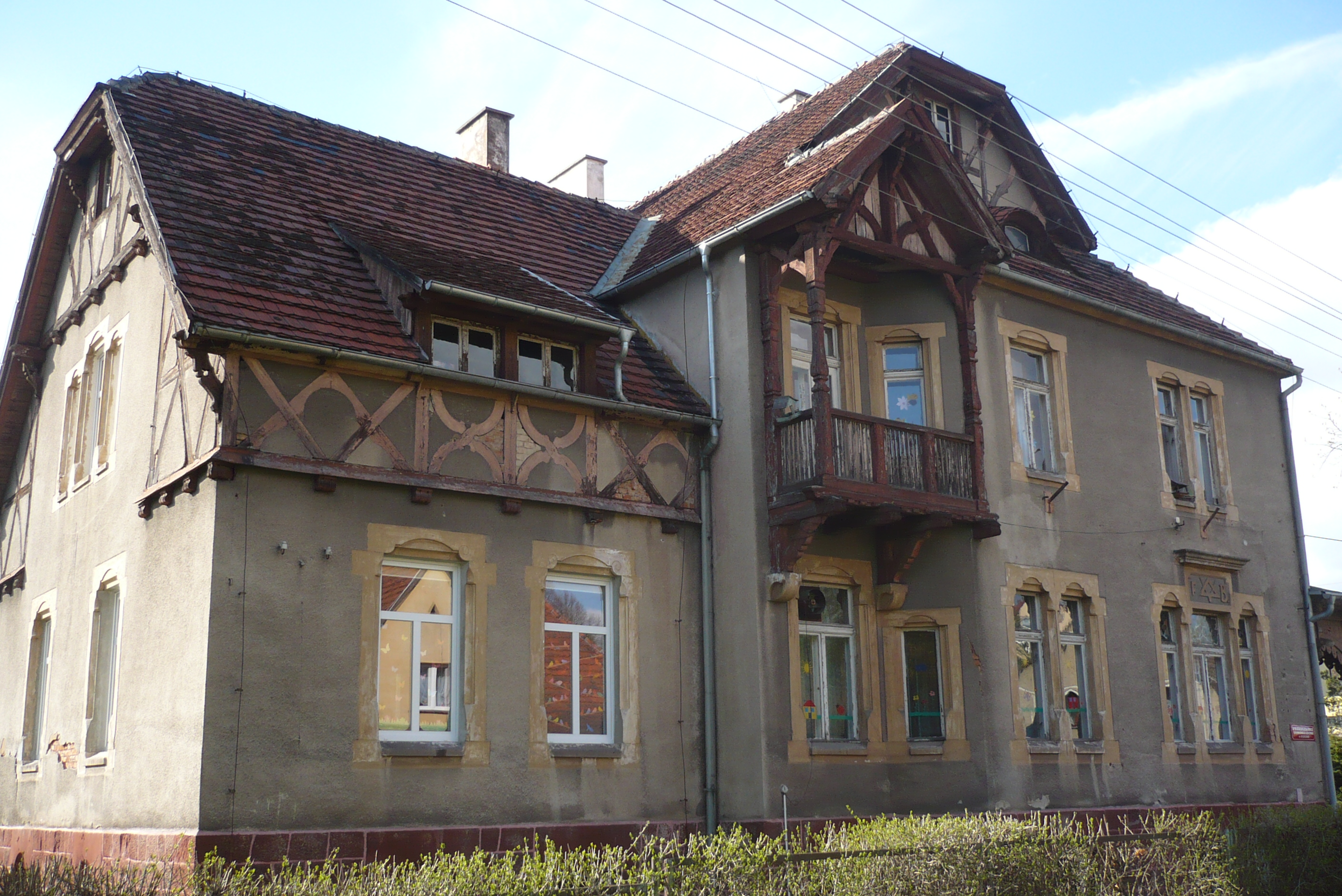 Bożków Przedszkole